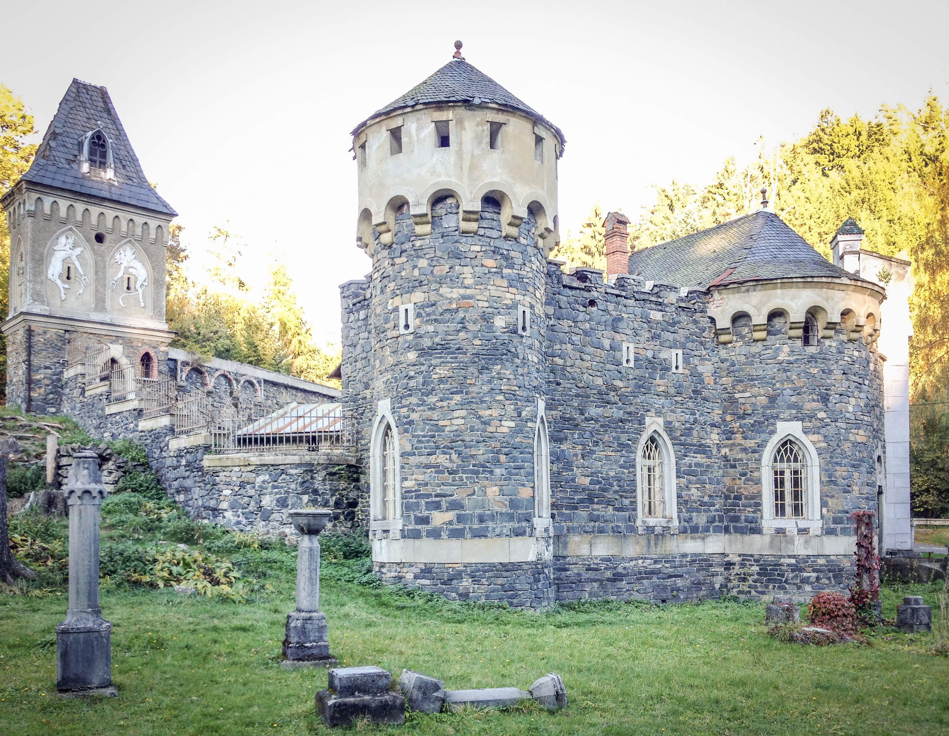 Hrádek Kunzov - boční pohled.